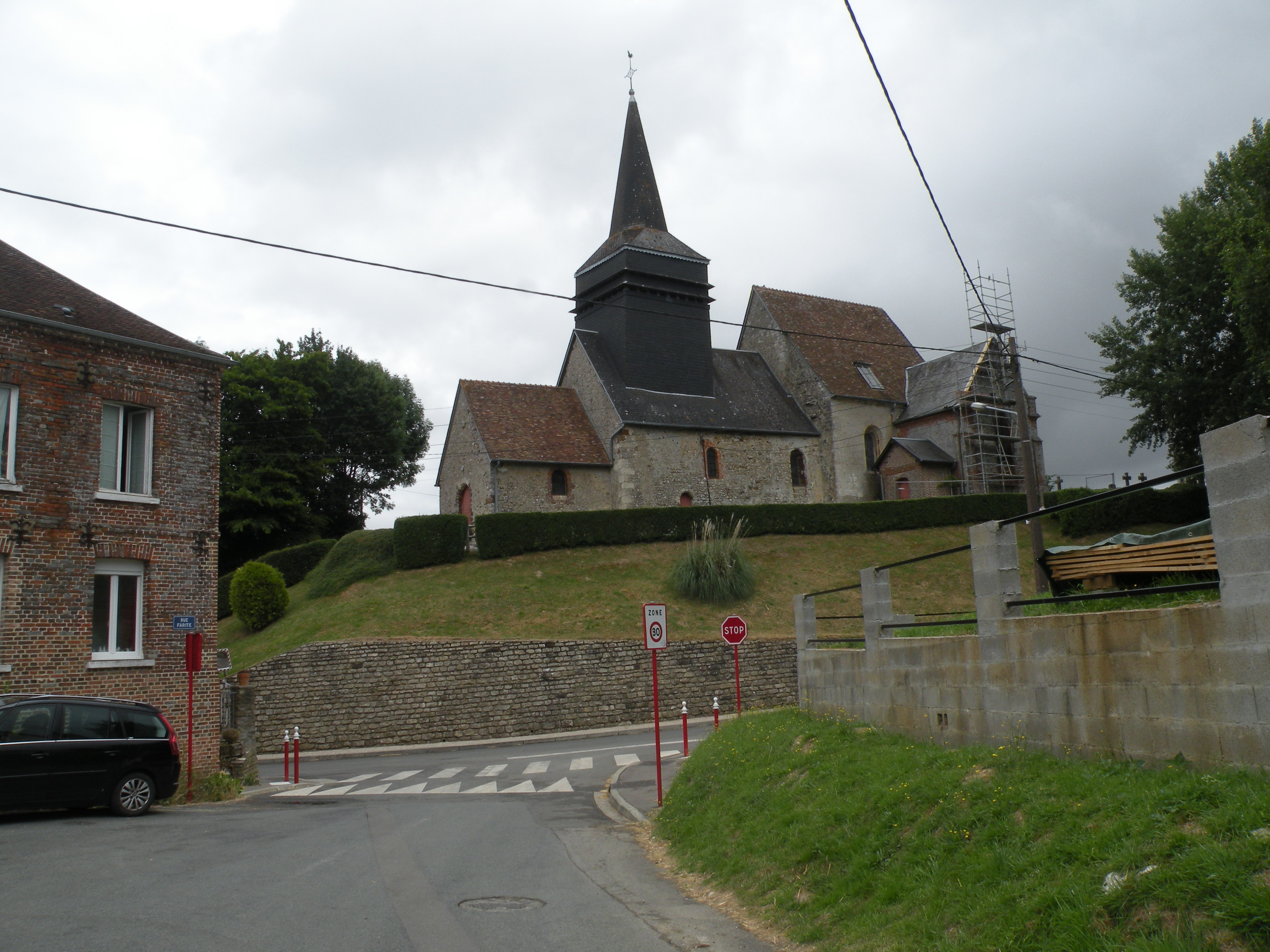 église Hanvoile